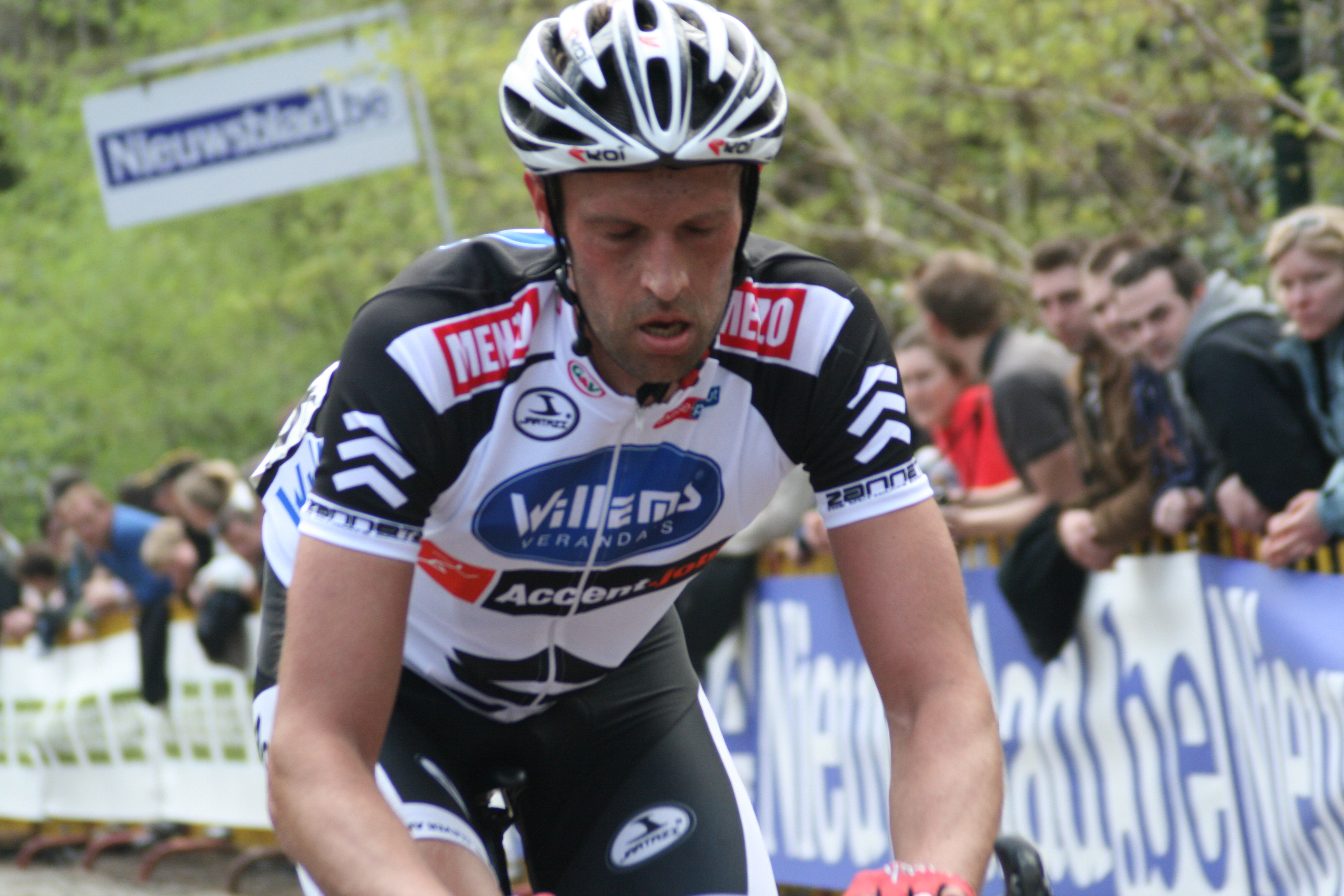 Gent-Wevelgem 2011, Kemmelberg